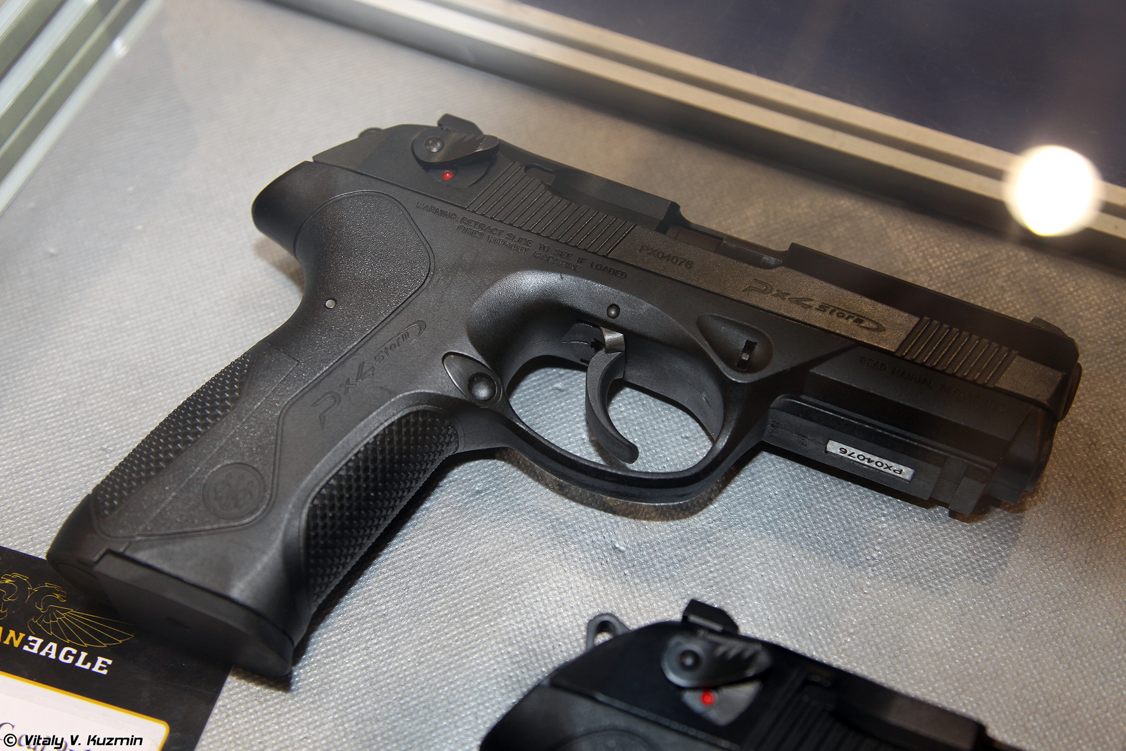 9x19 Beretta Px4 Storm type C